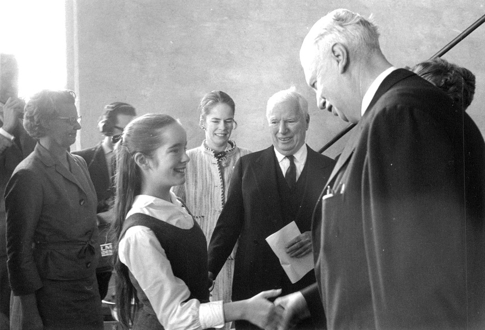 Charlie Chaplin med hustrun Oona O'Neill och dottern Josephine Chaplin tas emot på Arlanda av Carl Albert Anderson.